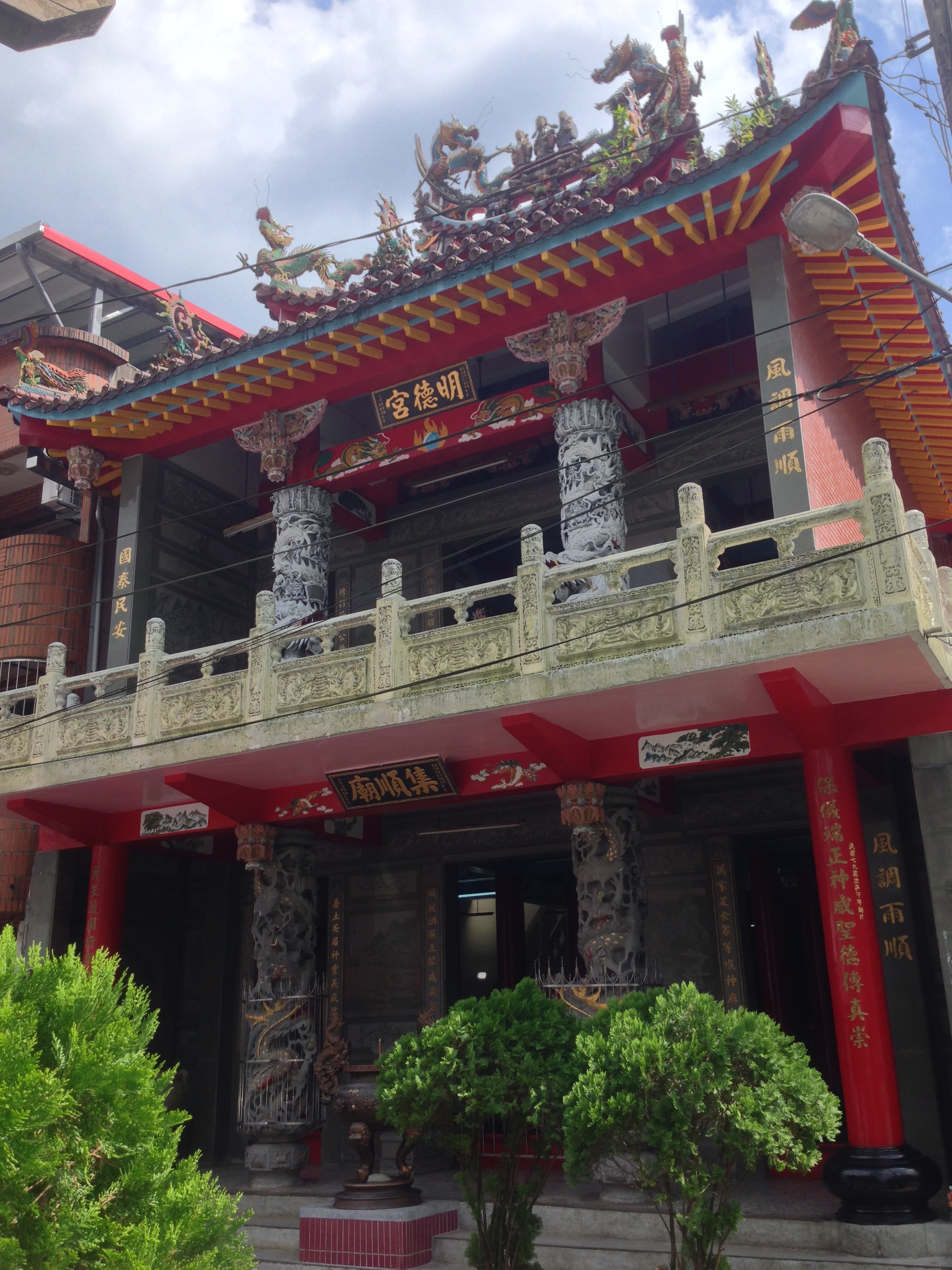 中文（台灣）: 石碇集順廟明德宮